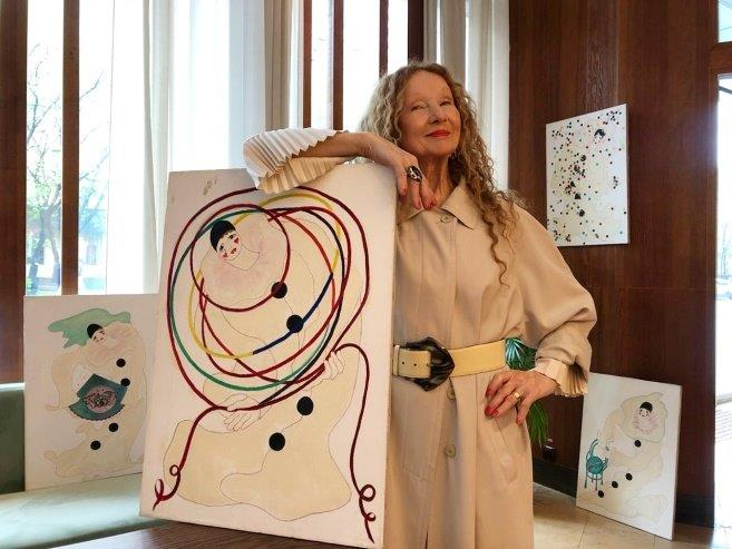 Картина из серии "Танцы Пьеро", 2007 г.